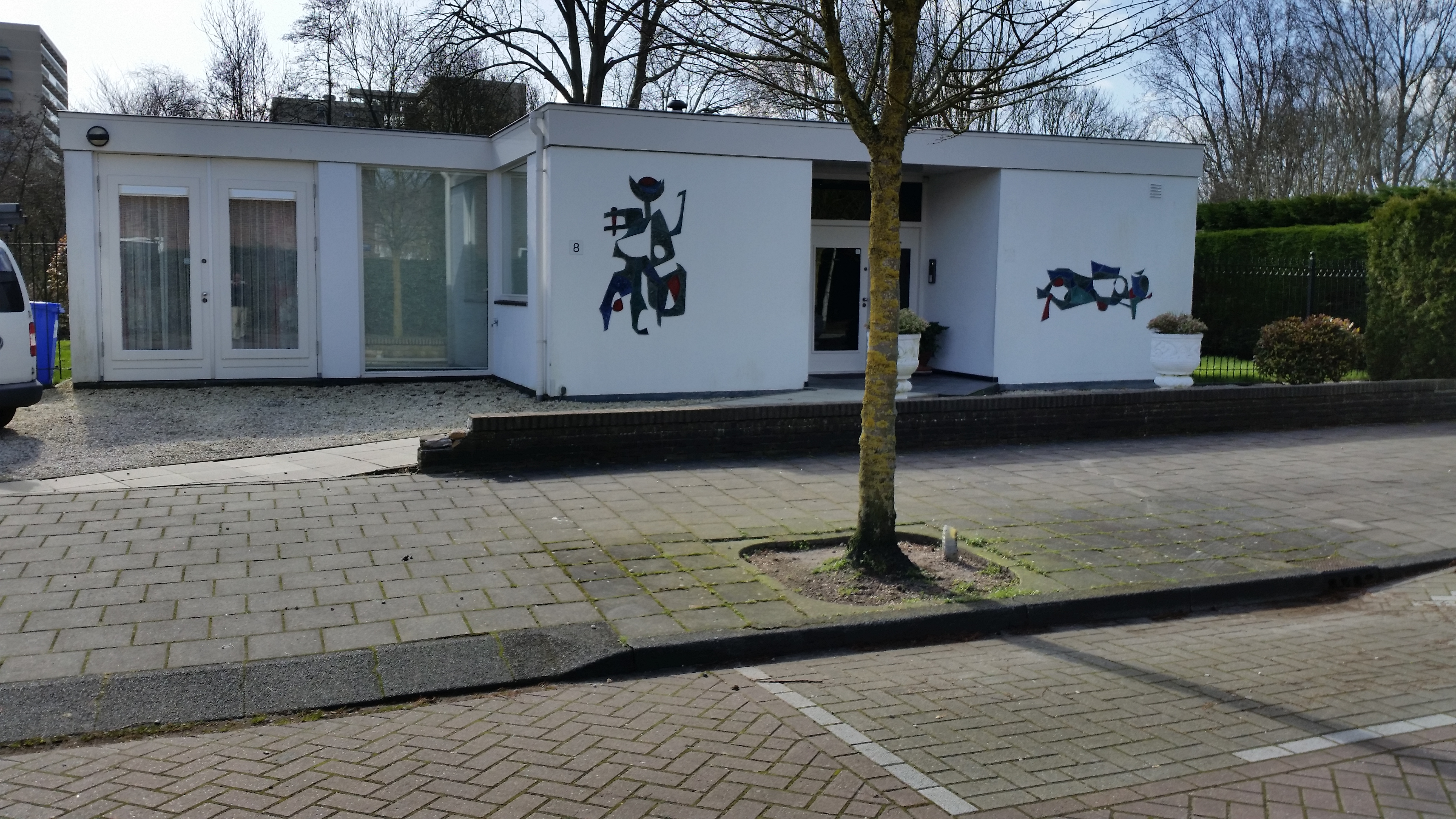 Impressie van Hartelstein, Amsterdam-Zuid (maart 2020)